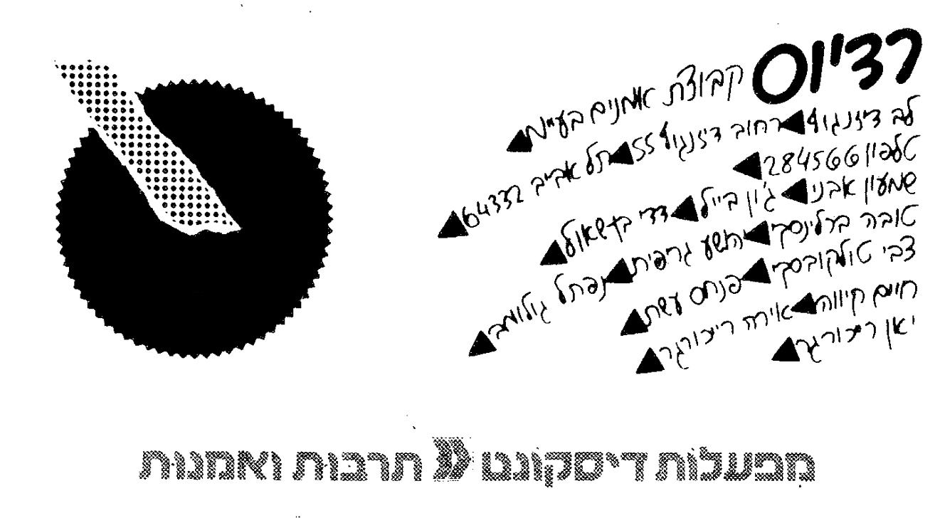 הלוגו של גלריה רדיוס